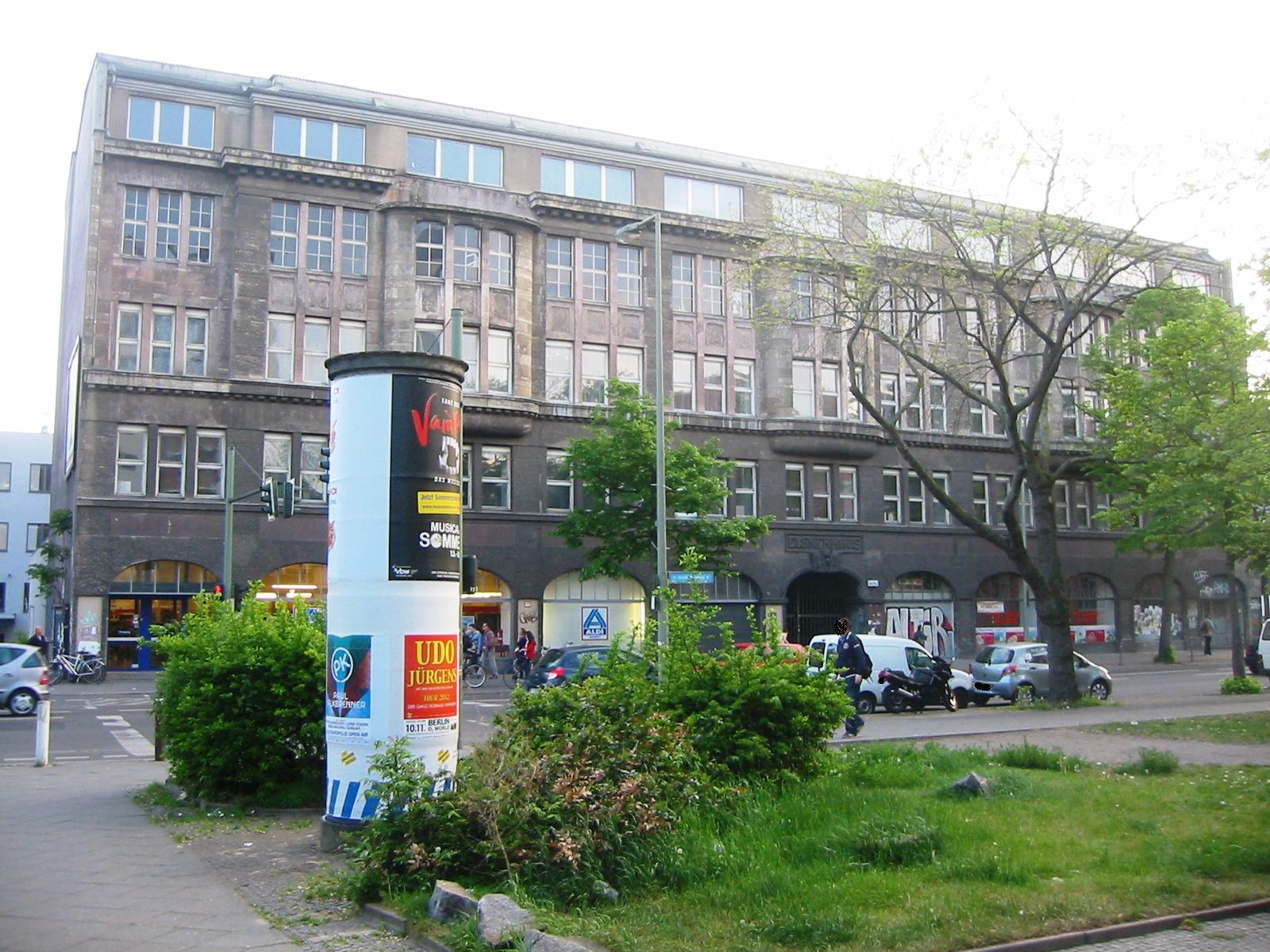 Denkmalgeschütztes Elsnerhaus in der Oranienstraße im Berliner Ortsteil Kreuzberg